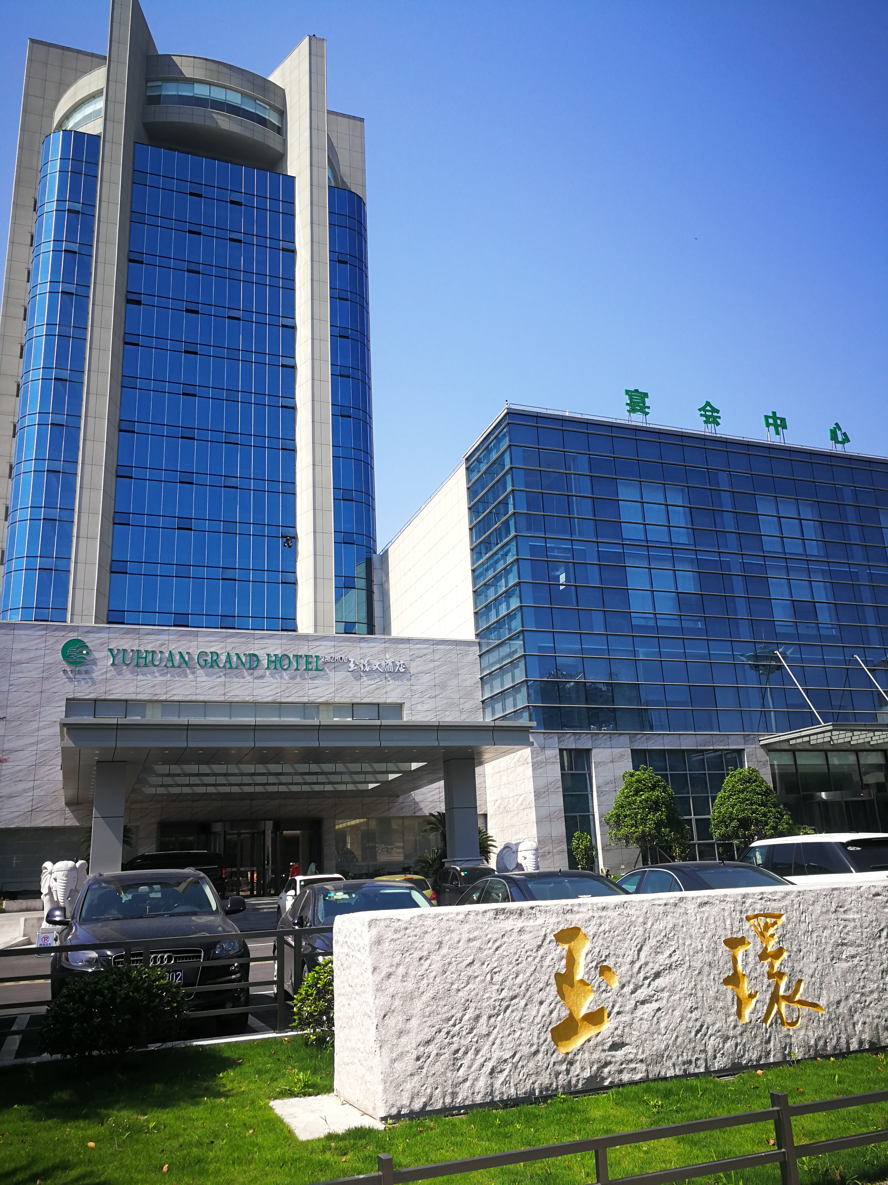 中文（中国大陆）: 玉环大酒店